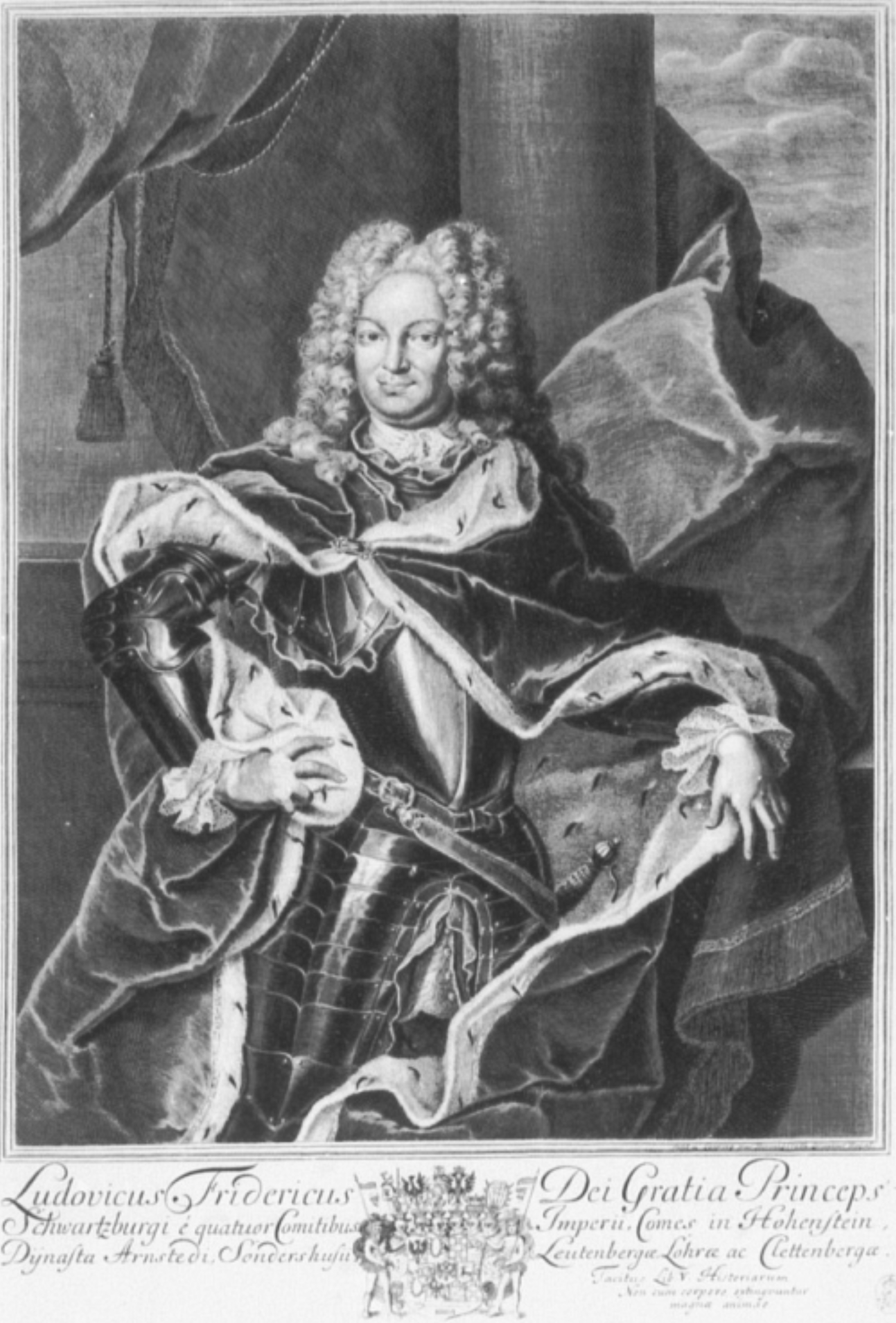 Ludwig Friedrich I, Prince of Schwarzburg-Rudolstadt (1667-1718)